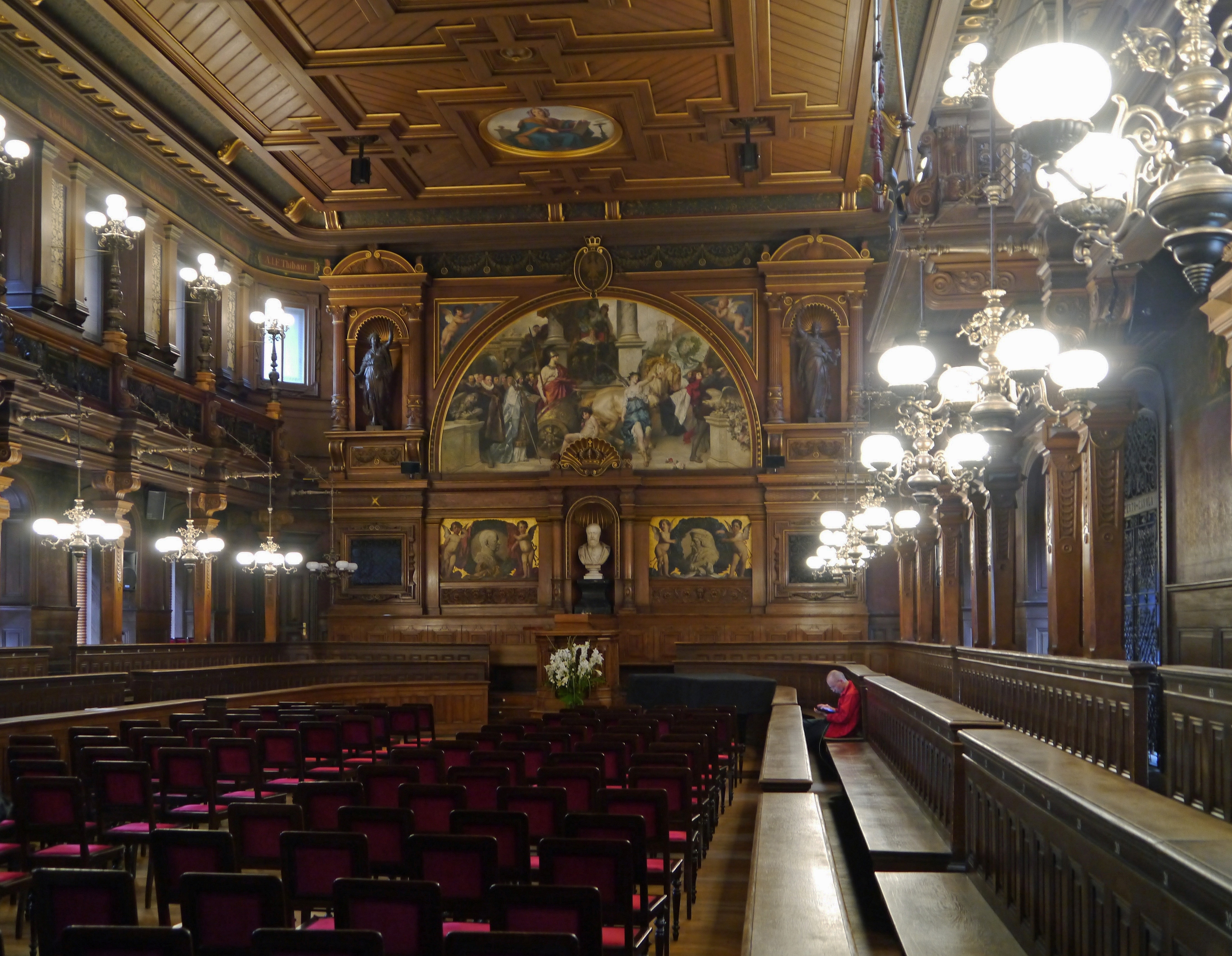 Die (alte) Aula der Ruprecht-Karls-Universität in Heidelberg (2012).